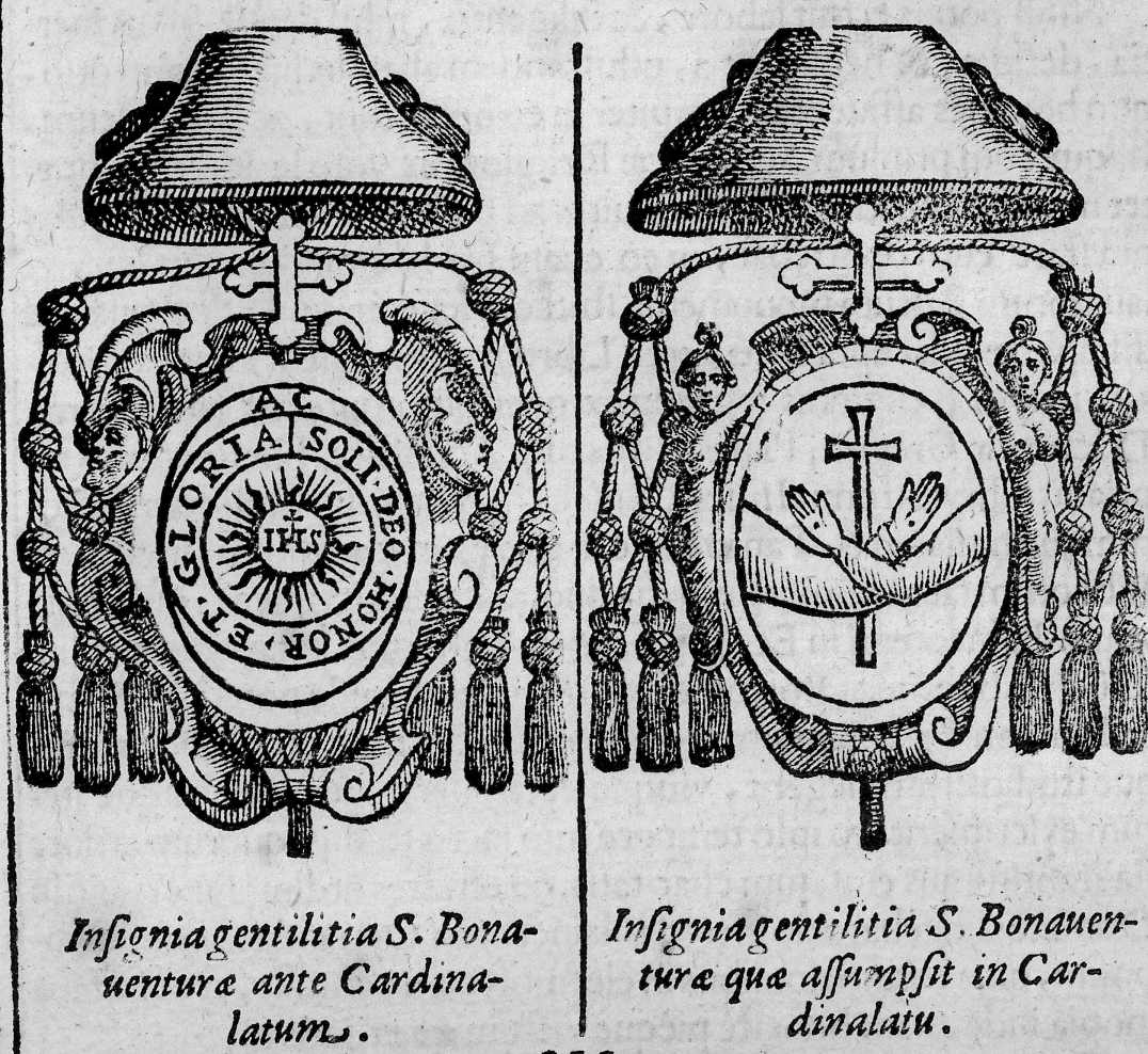 Domniemany herb Bonawentury jako generała zakonu (z napisem łac.: Samemu Bogu cześć i chwała) oraz jego herb jako kardynała.